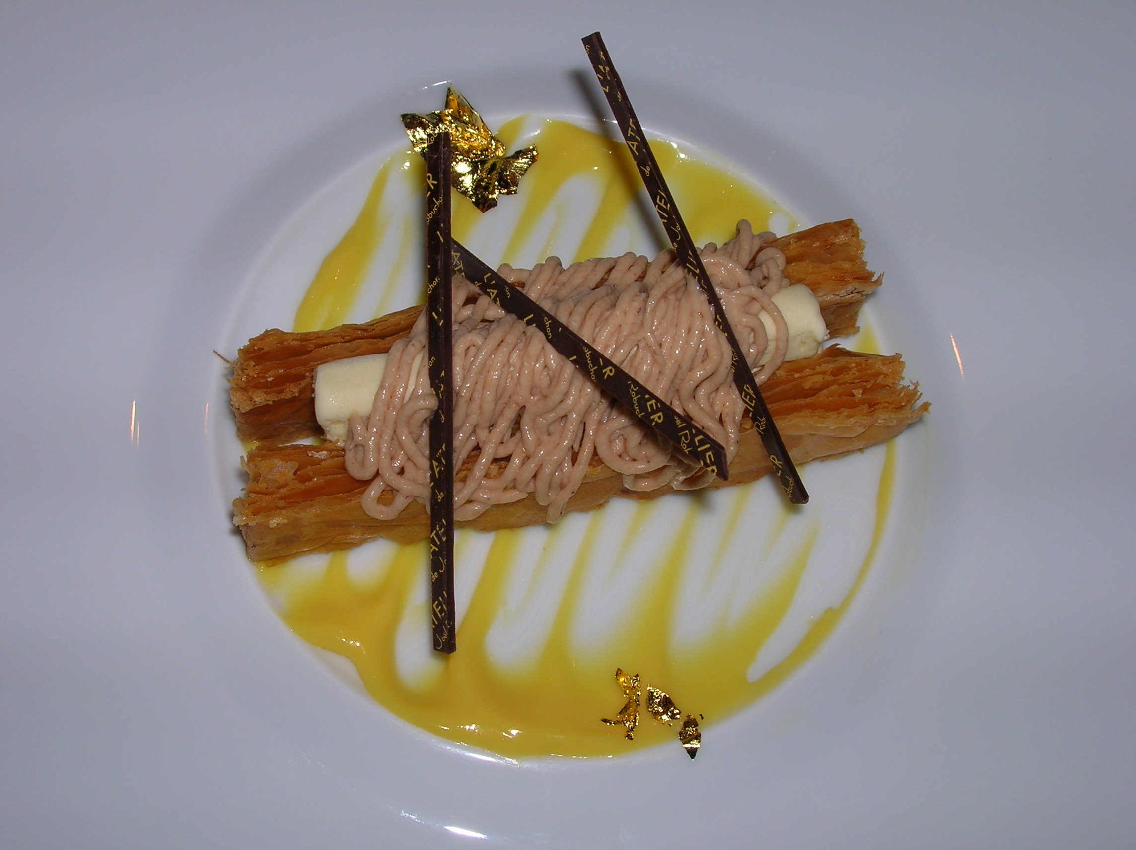 l'atelier du Robuchon Hong Kong